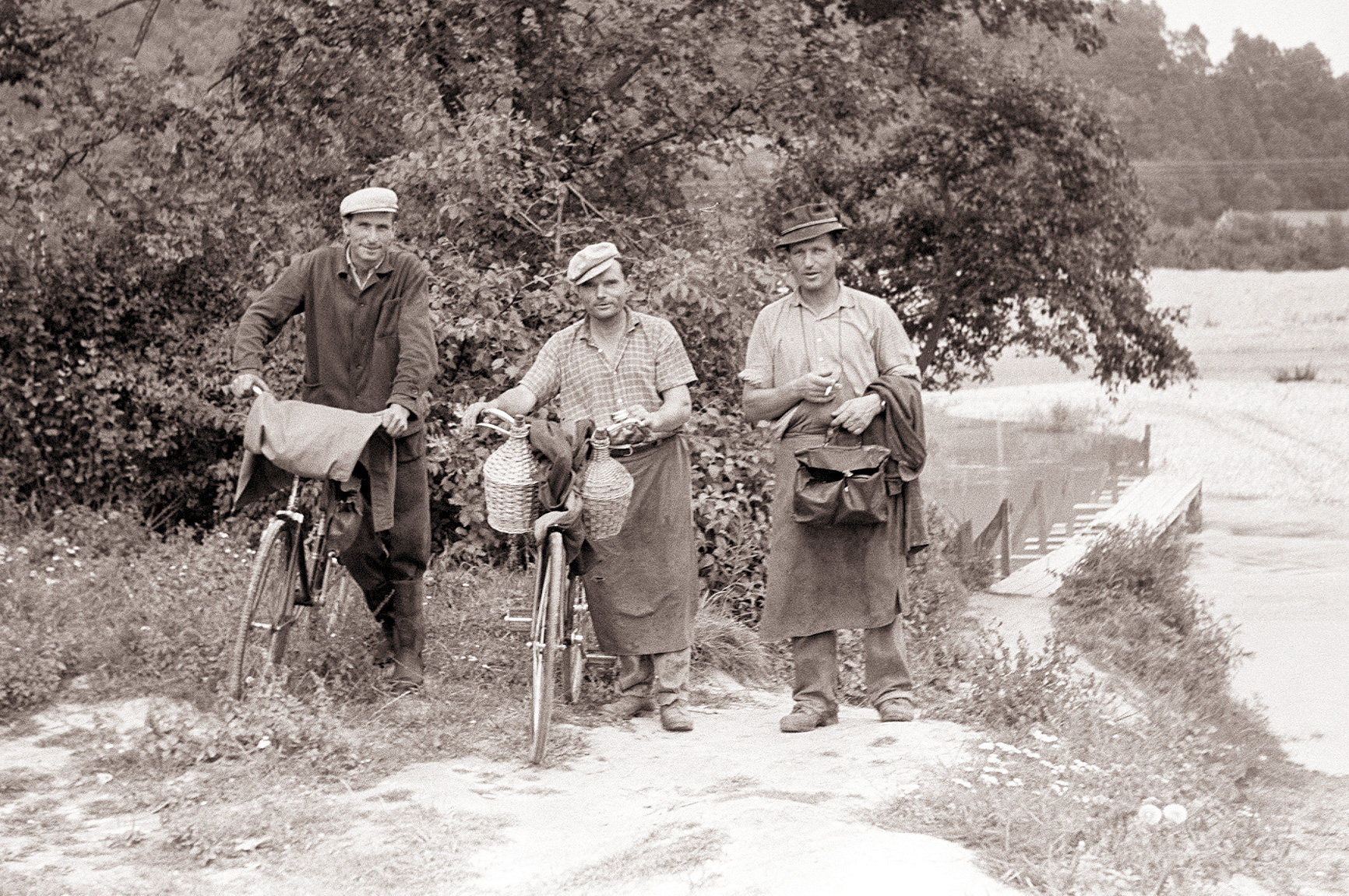 Obiralci na KG Kidričevo v Hajdošah po opravljenem delu.